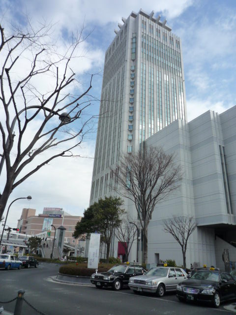 汐入駅前より撮影。